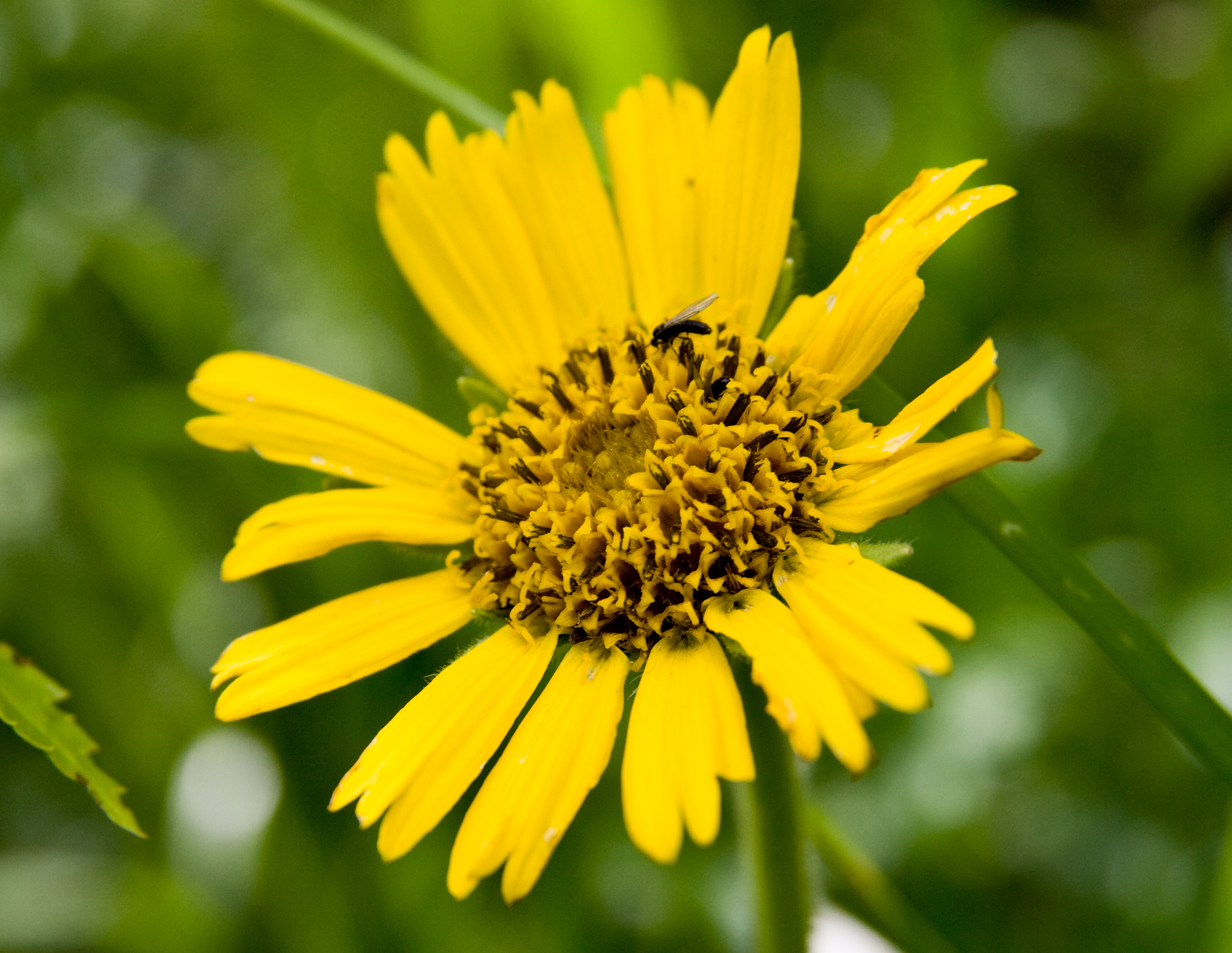 ウサギギク (学名:Arnica unalascensis var. tschonoskyi)